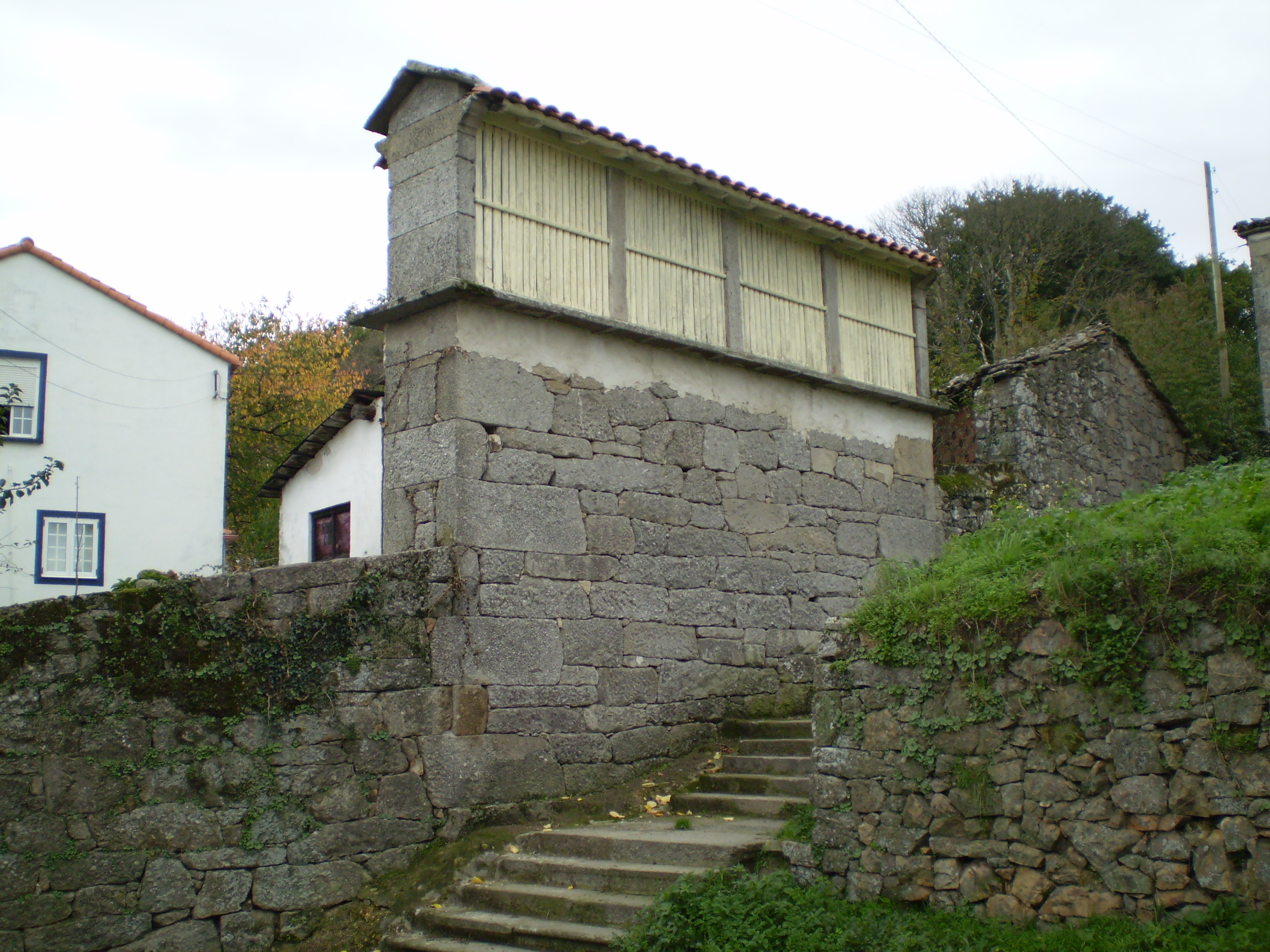 Hórreo en Casa de Naia (Antas de Ulla)